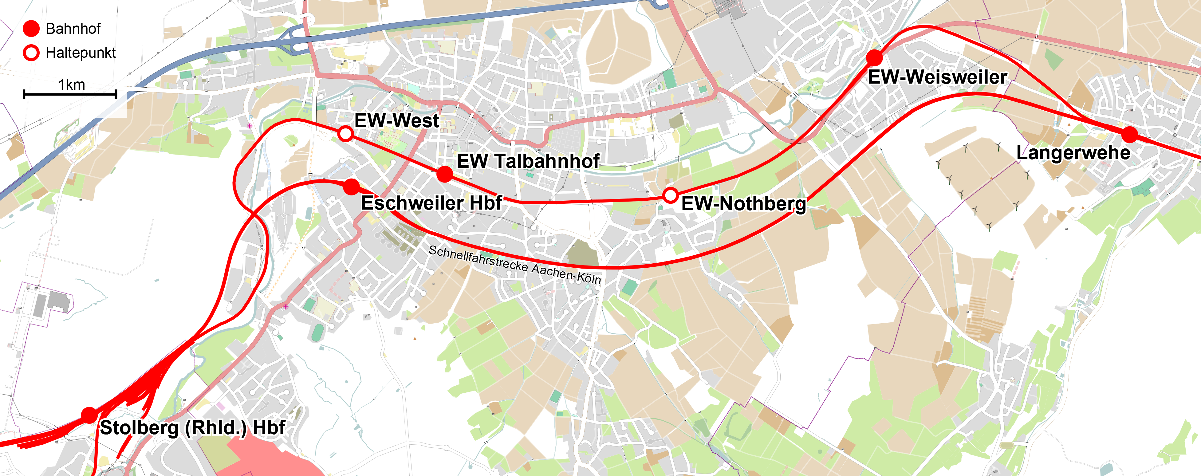 Bahnstrecken auf dem Gebiet der Stadt Eschweiler an der Schnellfahrstrecke Aachen-Köln. Nördlich die teils neugebaute, teils reaktivierte Strecke der euregiobahn, südlich die Schnellfahrstrecke.